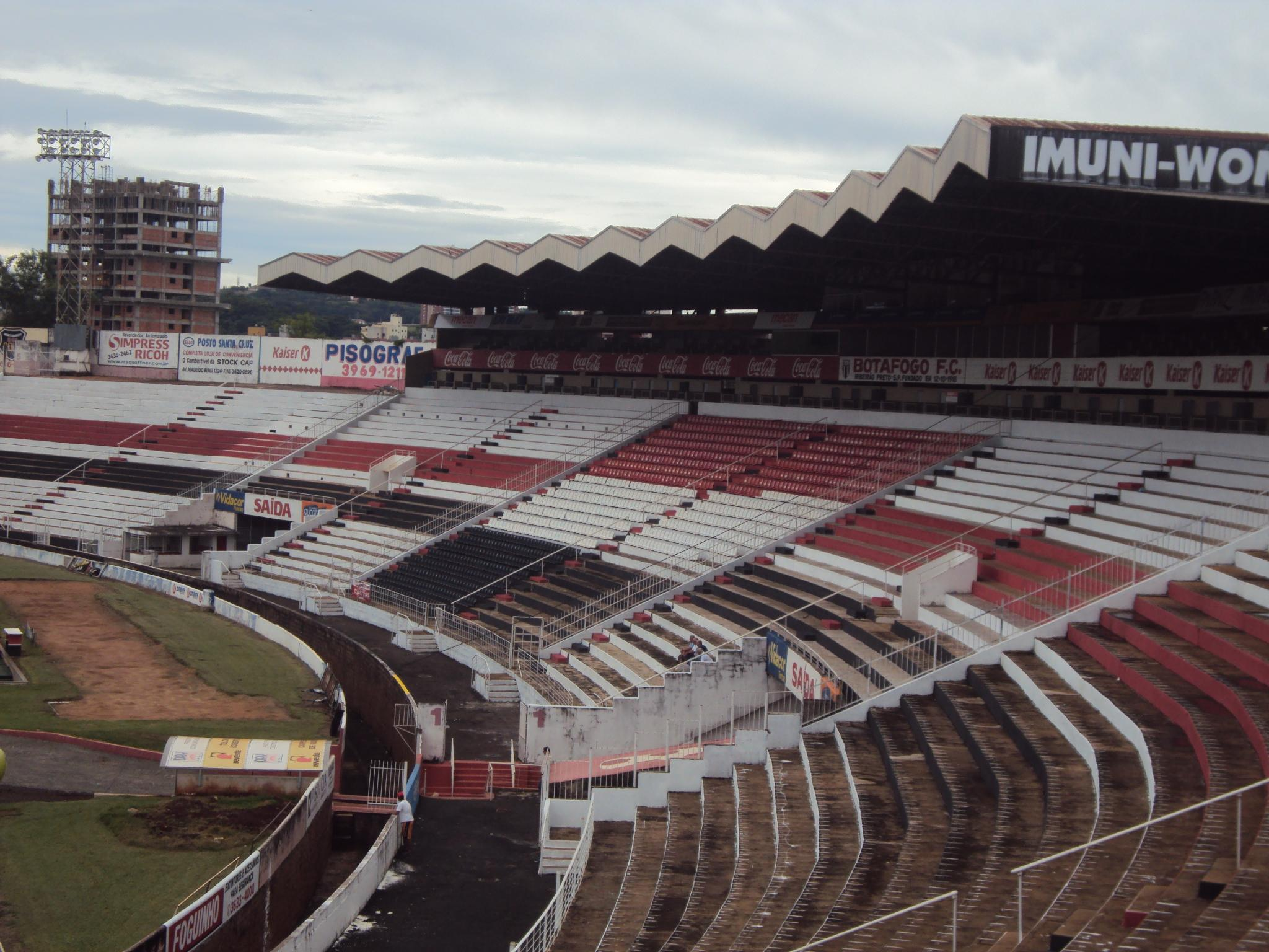 Setor das cadeiras cativa do Estádio Santa Cruz, do Botafogo Futebol Clube de Ribeirão Preto